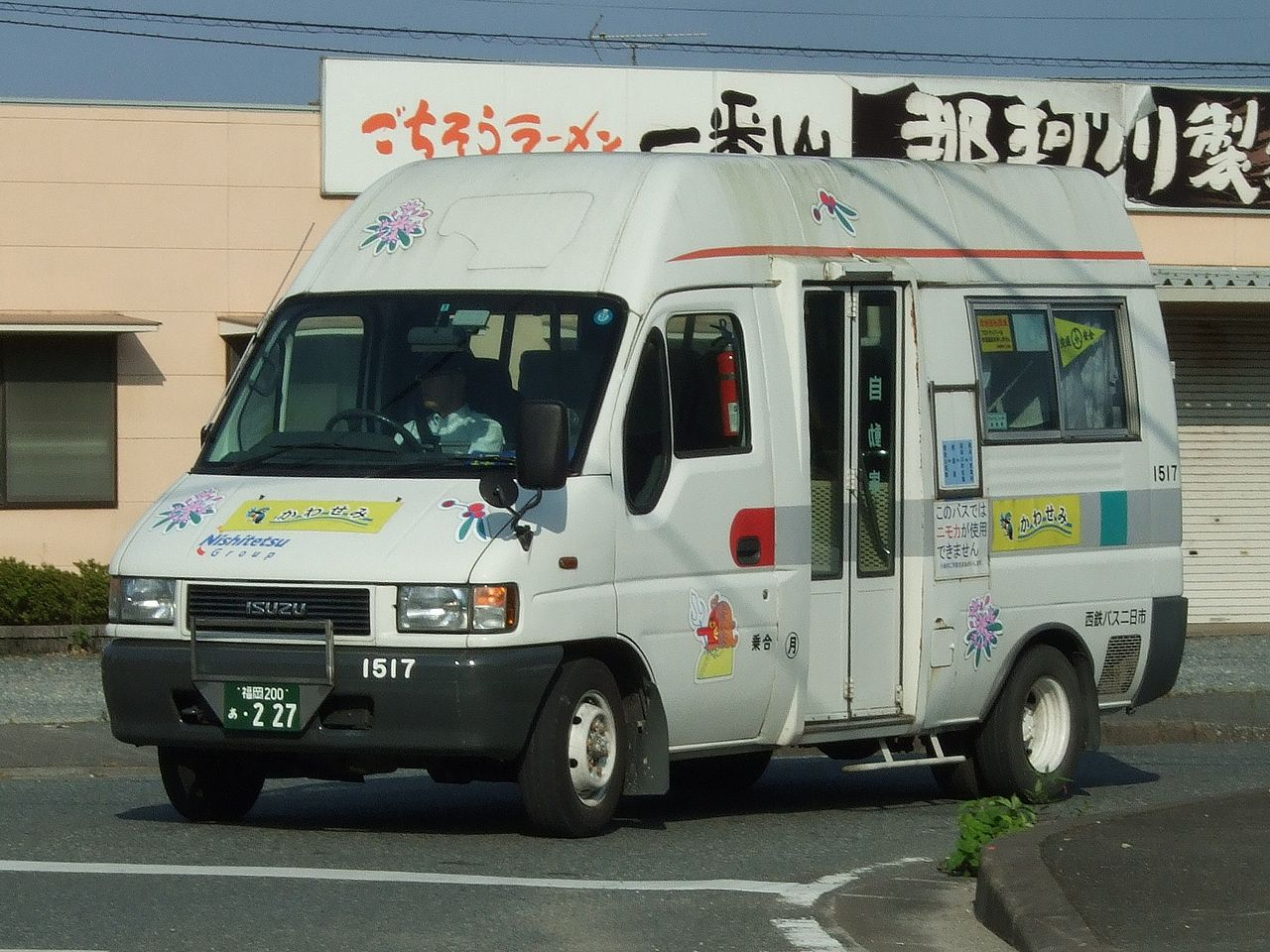 福岡県那珂川町コミュニティバス「かわせみ」号小型予備車 / “Kawasemi”, Nakagawa Town community bus